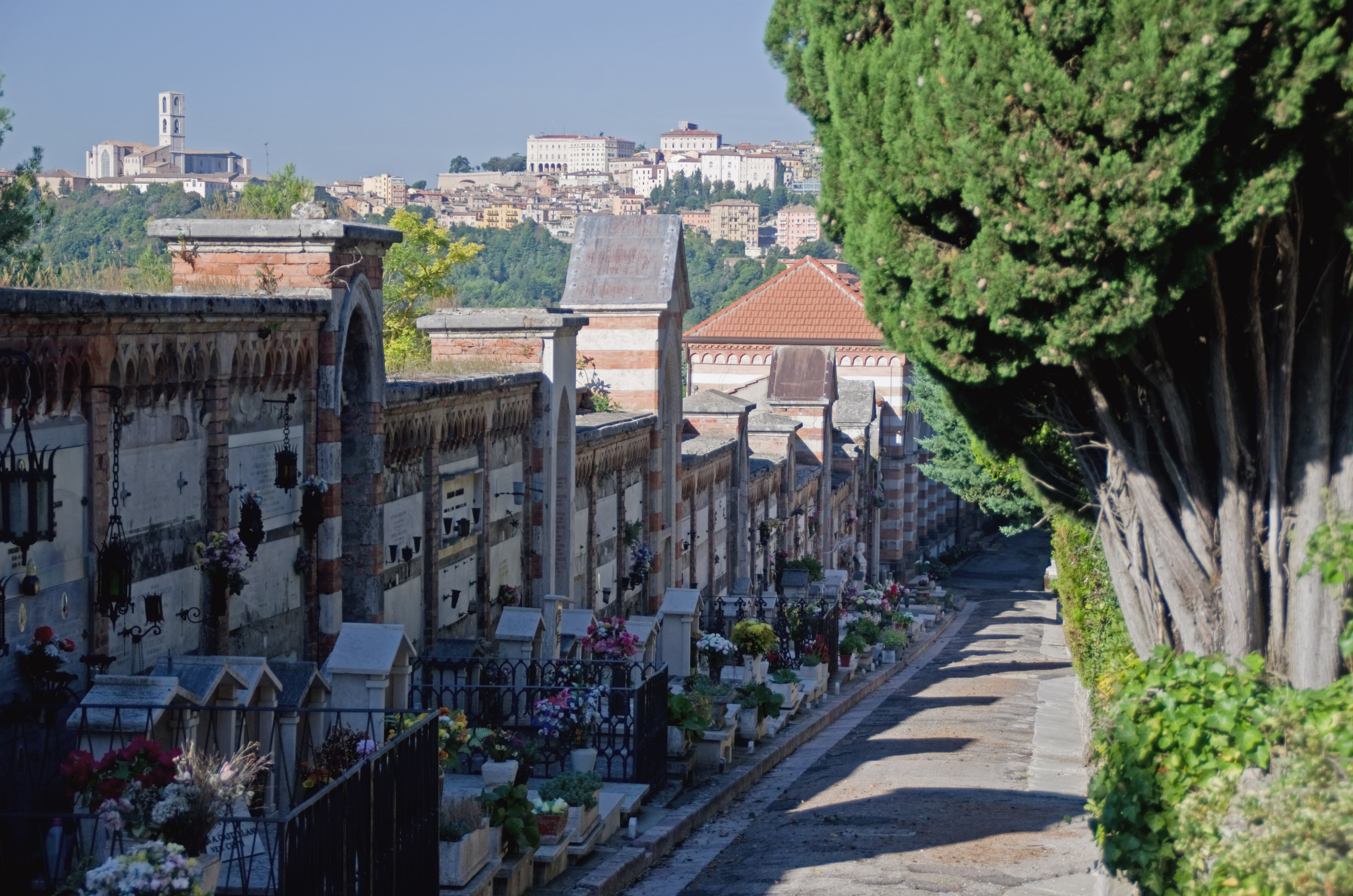 Cimitero Monumentale This is a photo of a monument which is part of cultural heritage of Italy.